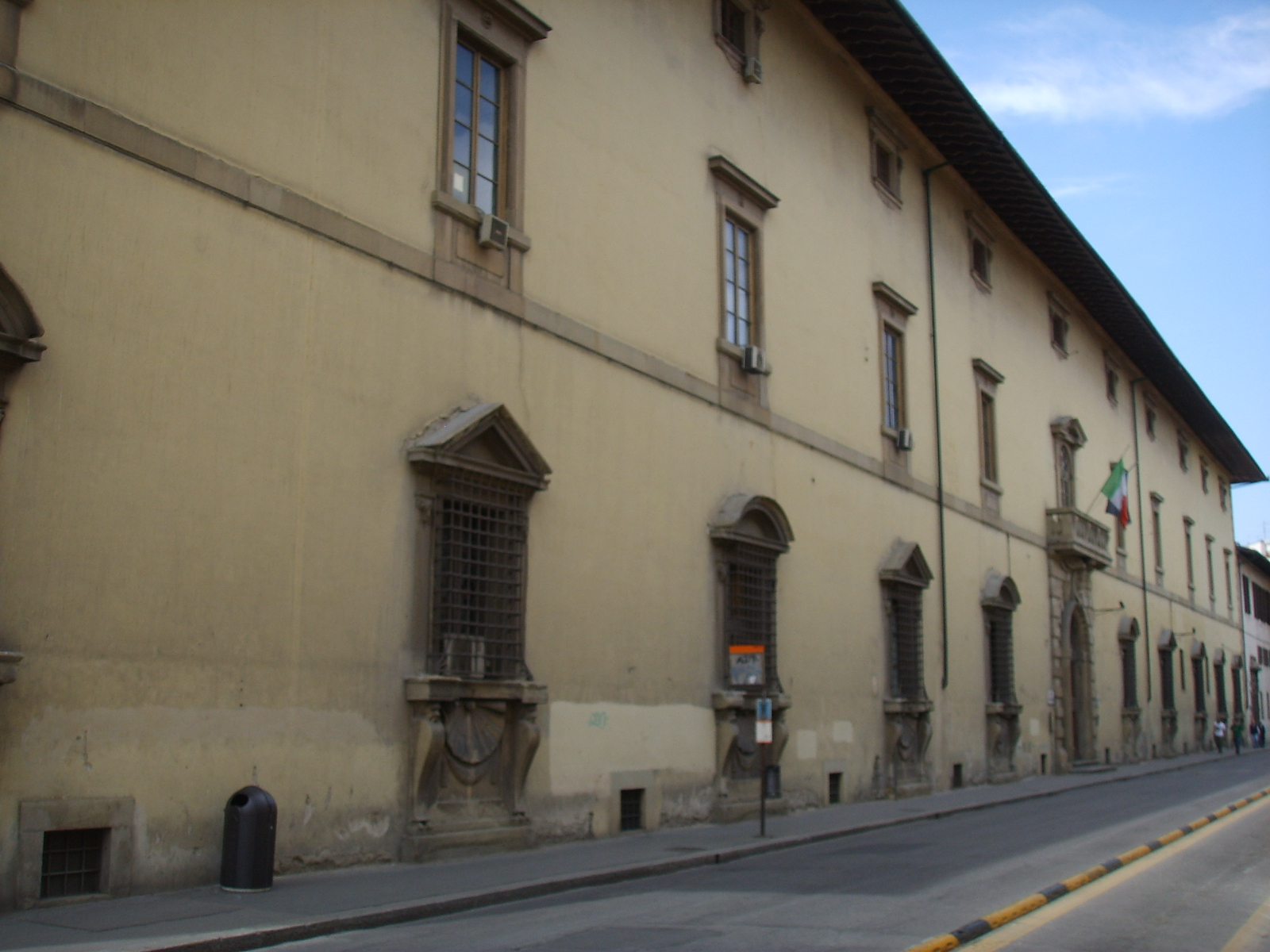 Casino Mediceo di San Marco in Florence, detail